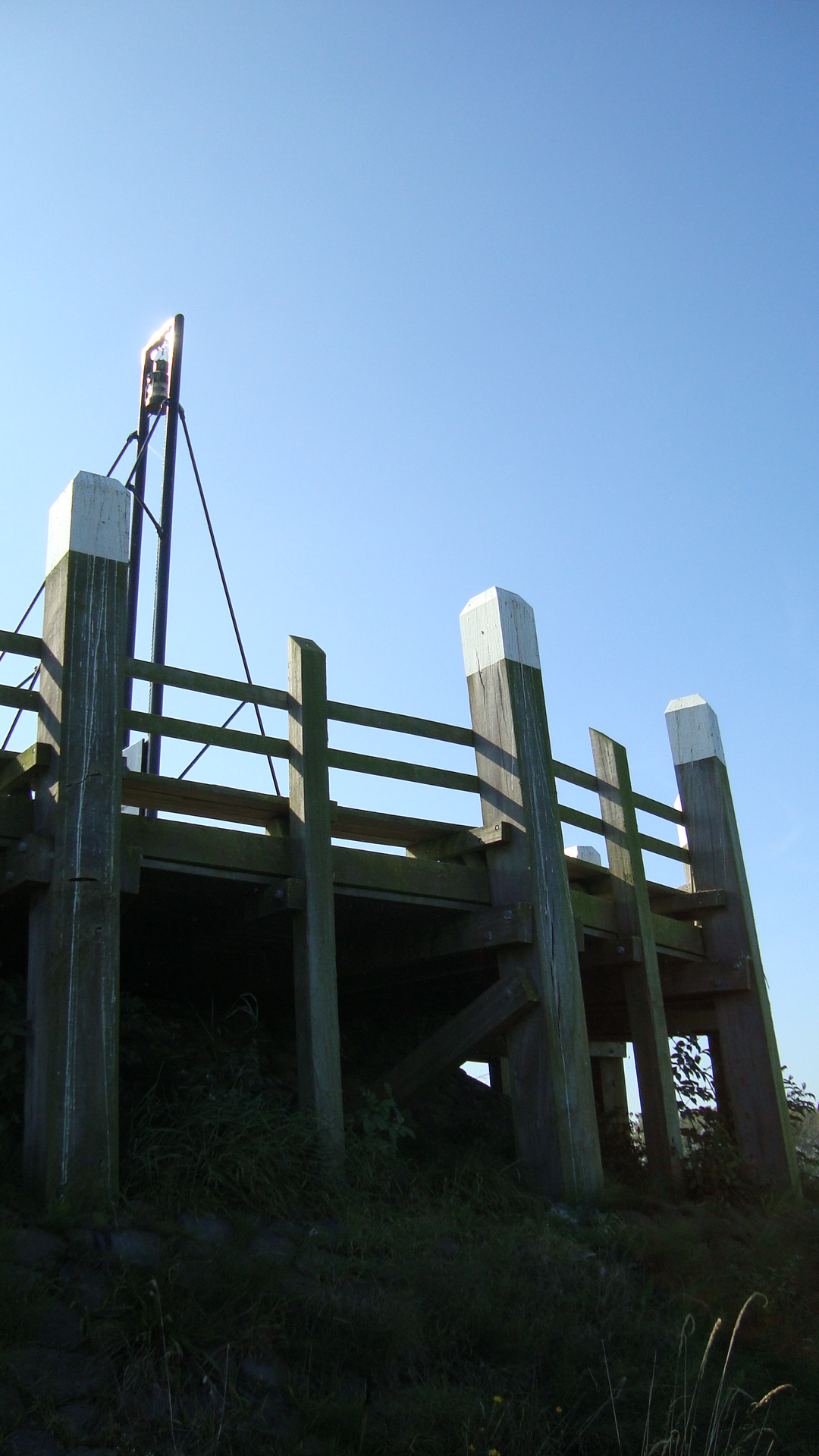 Foto genomen vanaf de zijkant van de Kop van 't Ende. Het havenlicht is goed zichtbaar net als de vloedpalen.